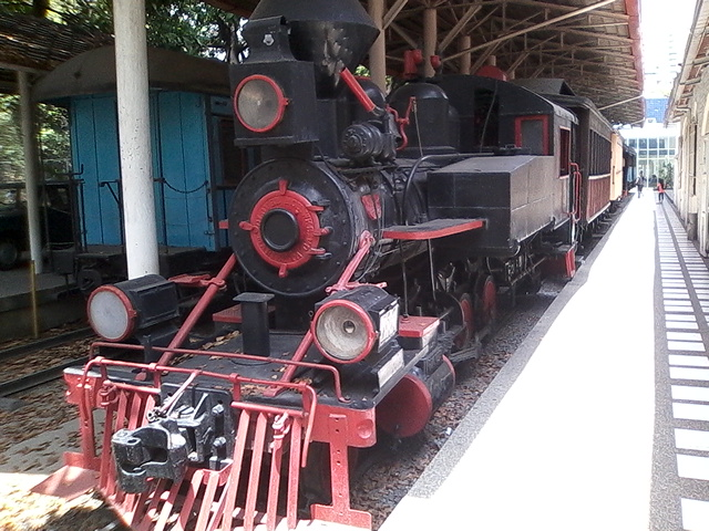 Este tren o ferrocarril, Representa un antes y un después en la historia Venezolana y su desarrollo automotor. Hoy detenido casi que en el tiempo en su ultima parada, la estación el encanto, hoy museo automotor de Caracas. muestra su presencia y entre sus rieles el fin de la historia ferroviaria de Venezuela en las épocas de antaño.